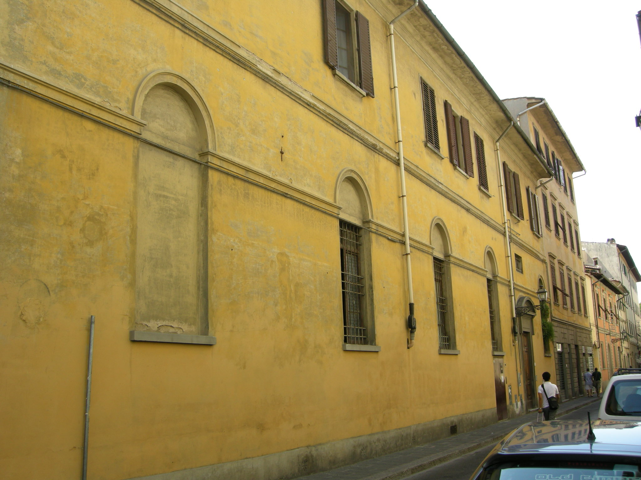 Istituto di Sant'Agnese (Florence)